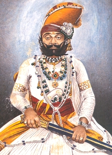 Takht Singh